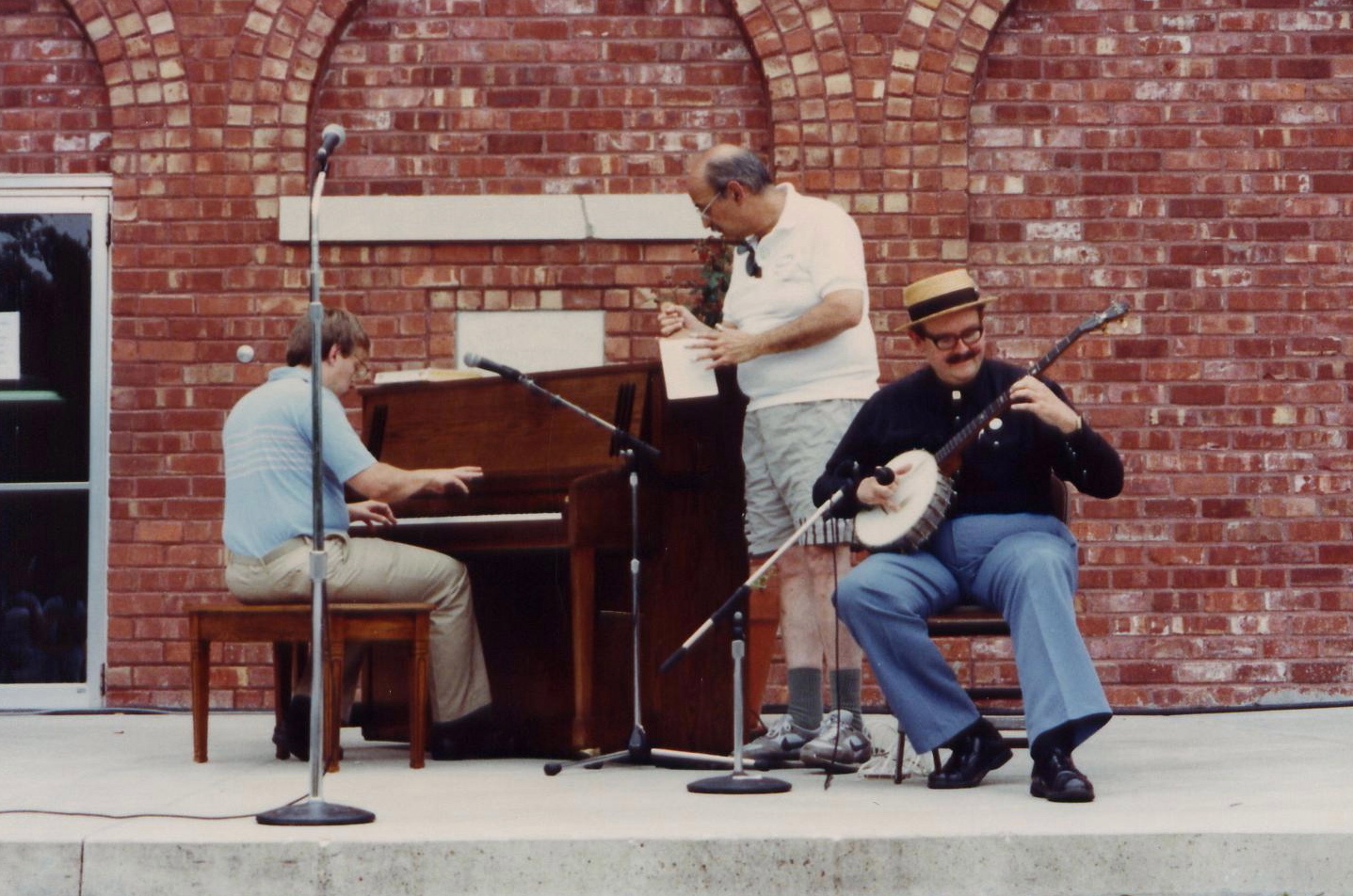 1990 "Scott Joplin Ragtime Festival", Sedalia, Missouri.